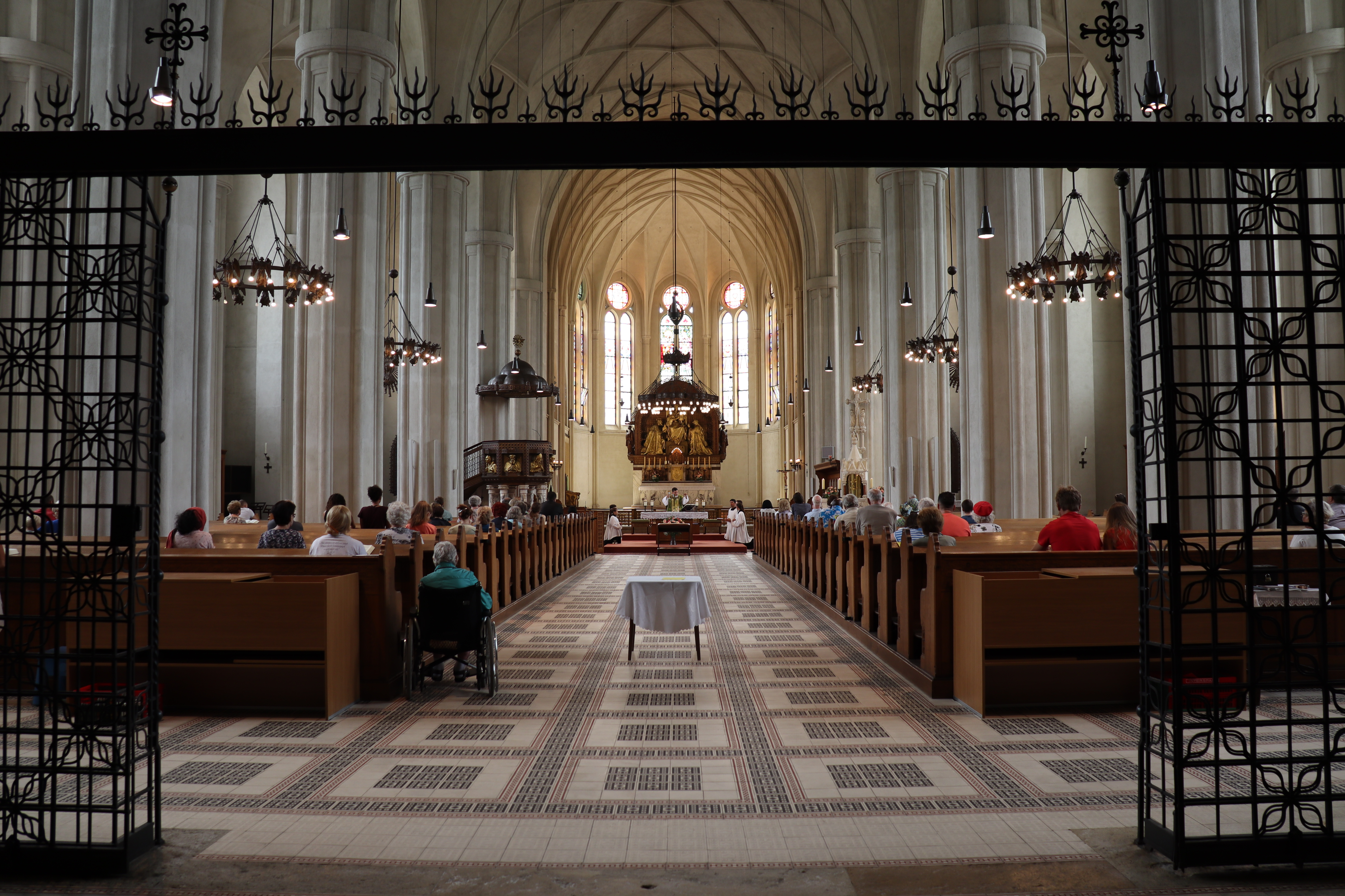 Donaufelder Pfarrkirche hl. Leopold Innenansicht